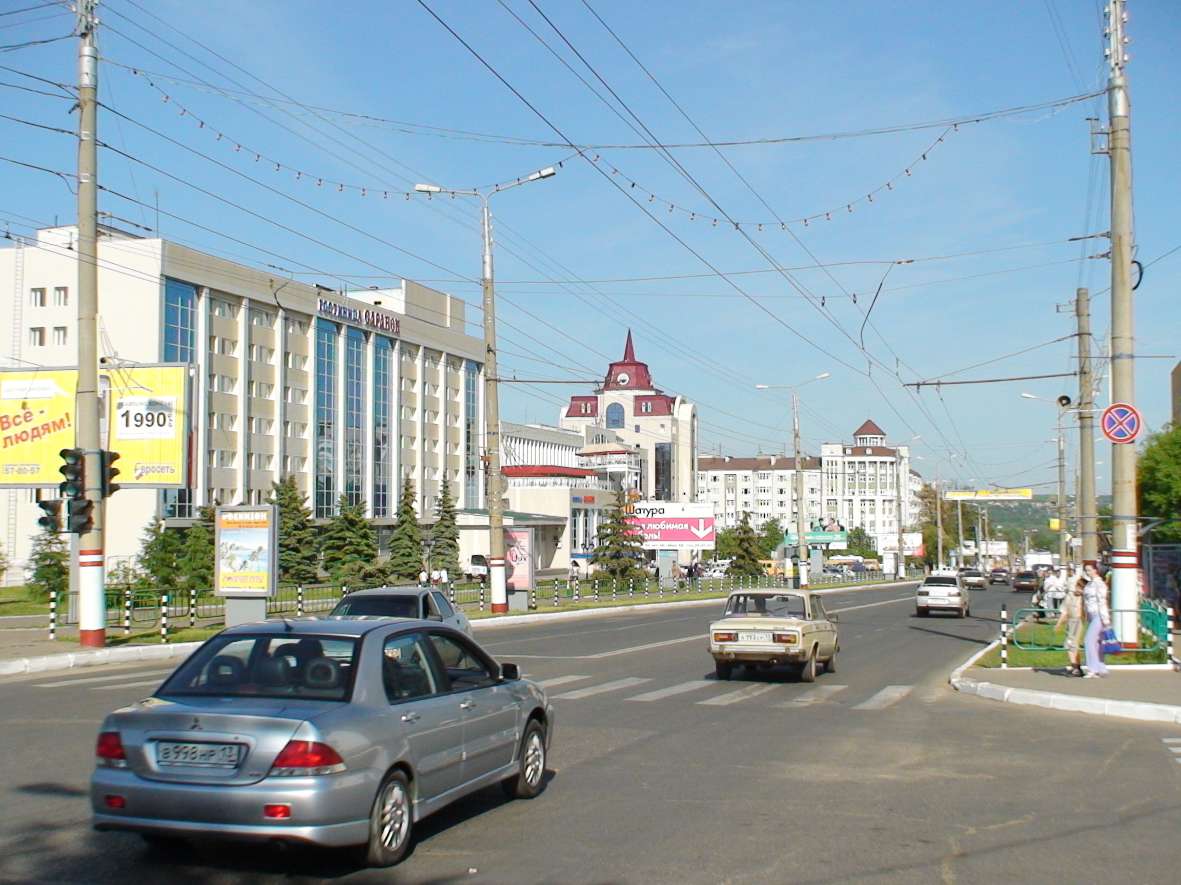 ул.Коммунистическая - одна из главных улиц города.